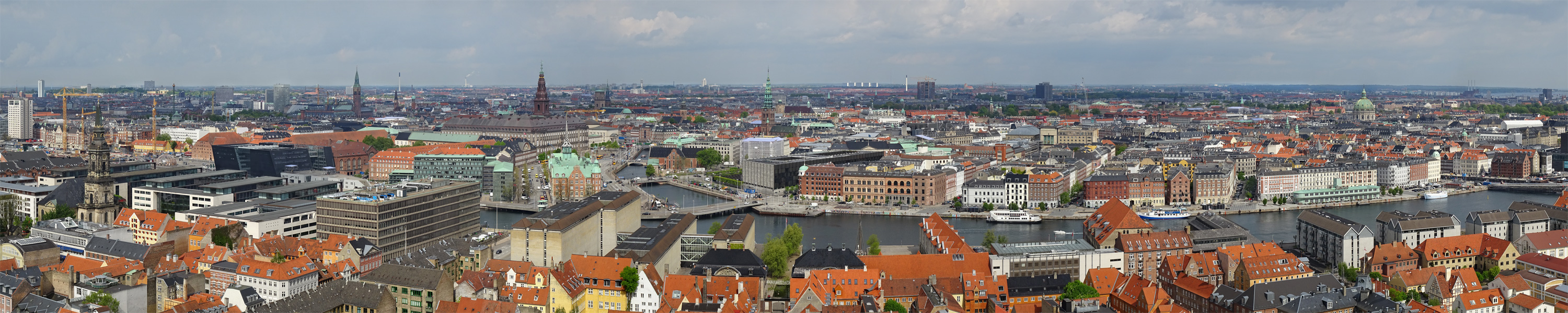 København, Danmark.